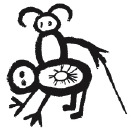 Вторая пиктограмма "Книги дикарей"